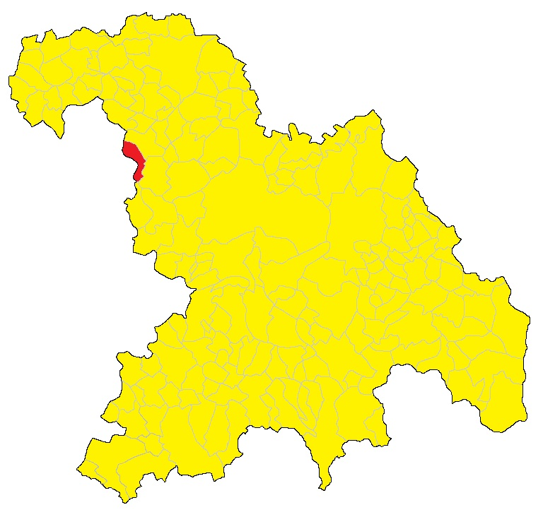 Mappa di Altavilla Monferrato (AL).